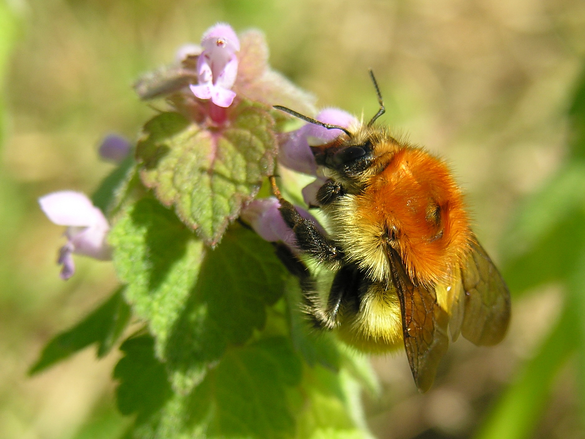 Abellón, Oroso, (Galicia)